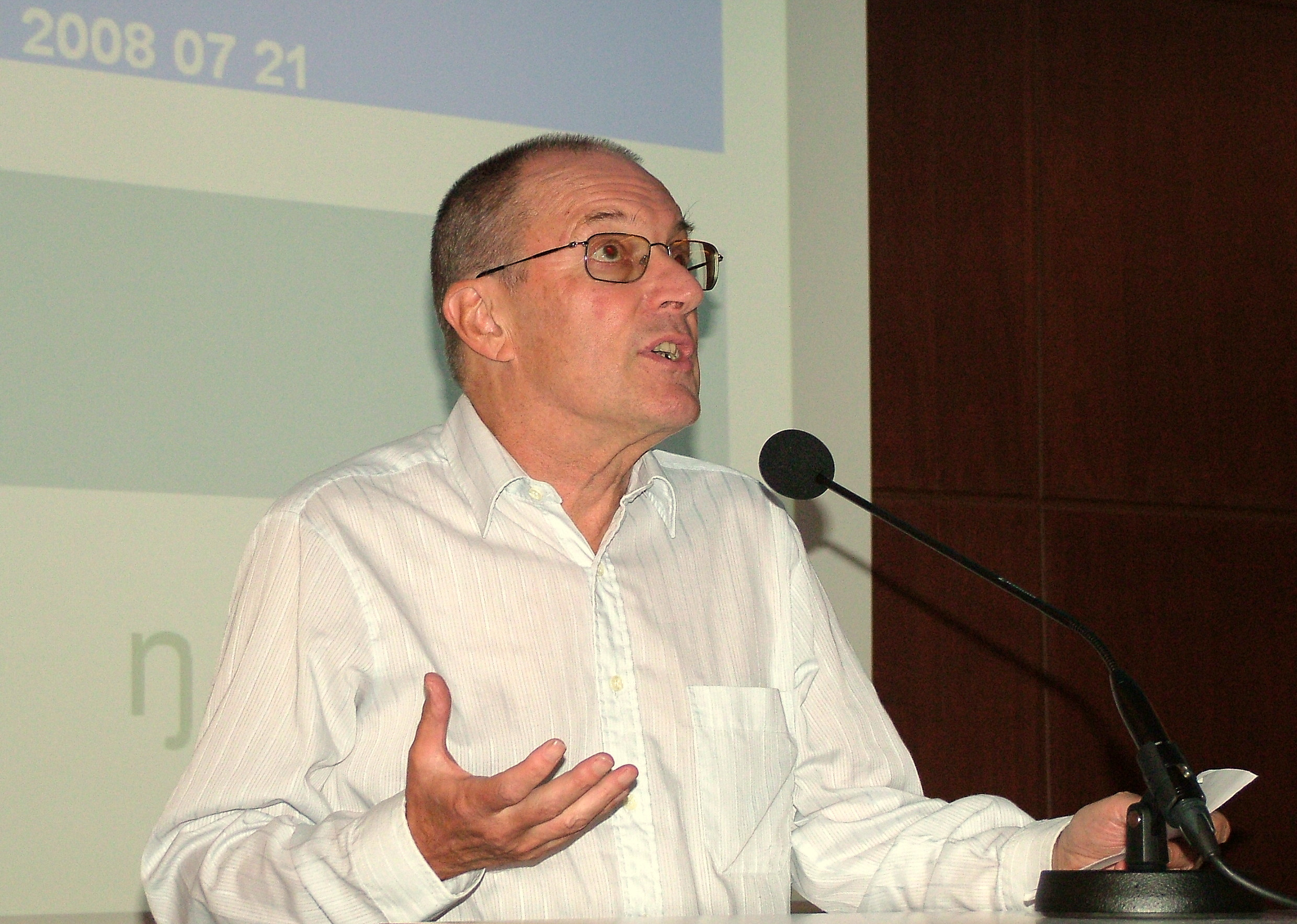 Universala Kongreso de Esperanto, Roterdamo 2008. John Wells, IKU-prelego: "La mirinda mondo de la parolsonoj".